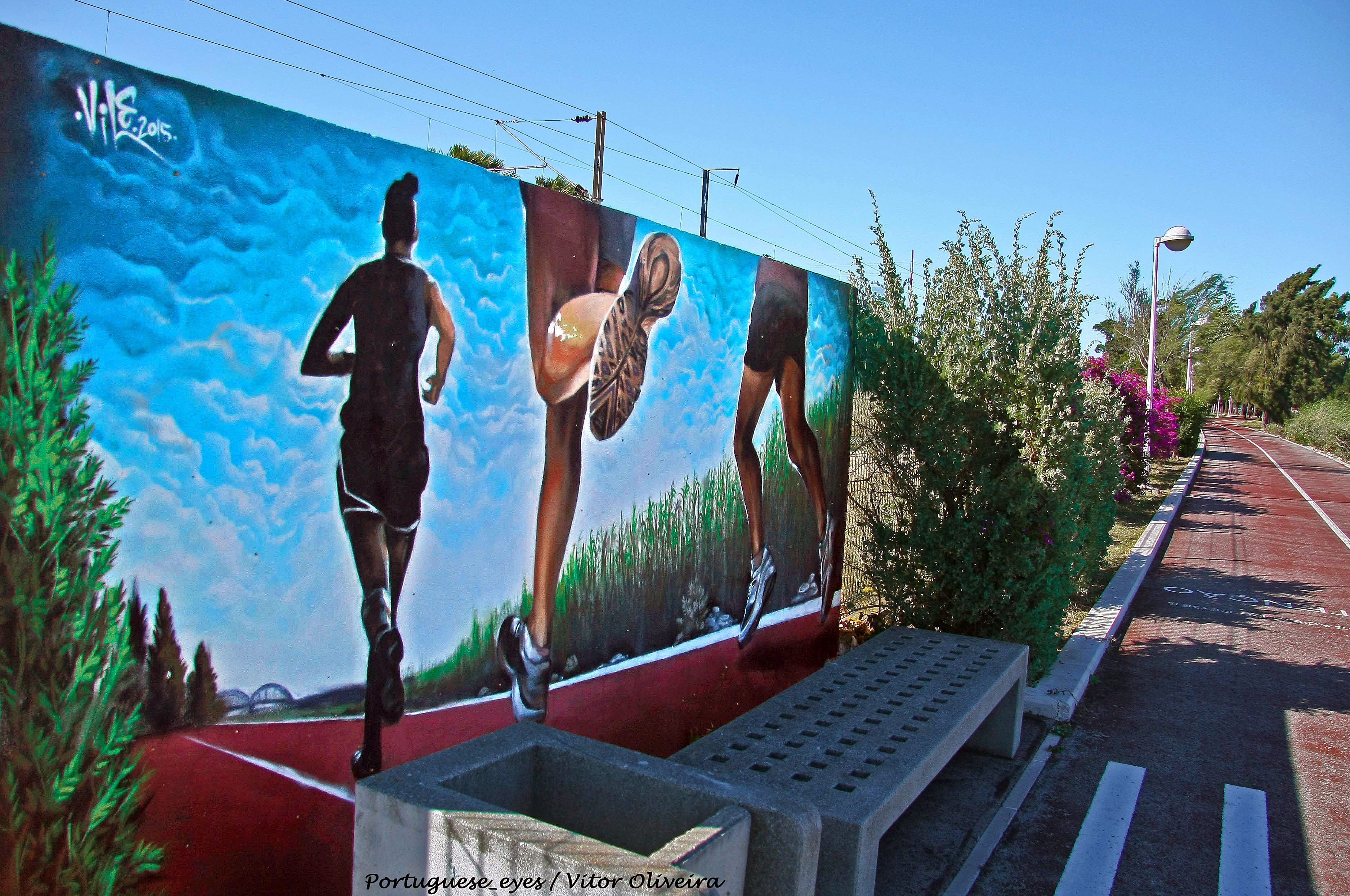 Passeio Pedonal Ribeirinho de Alhandra - Portugal 🇵🇹